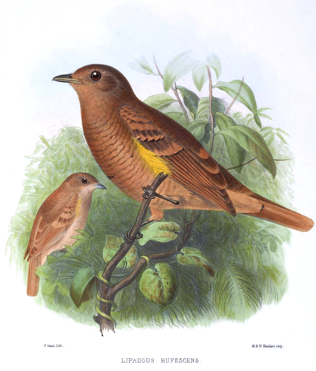 Lipaugus rufescens = Laniocera rufescens